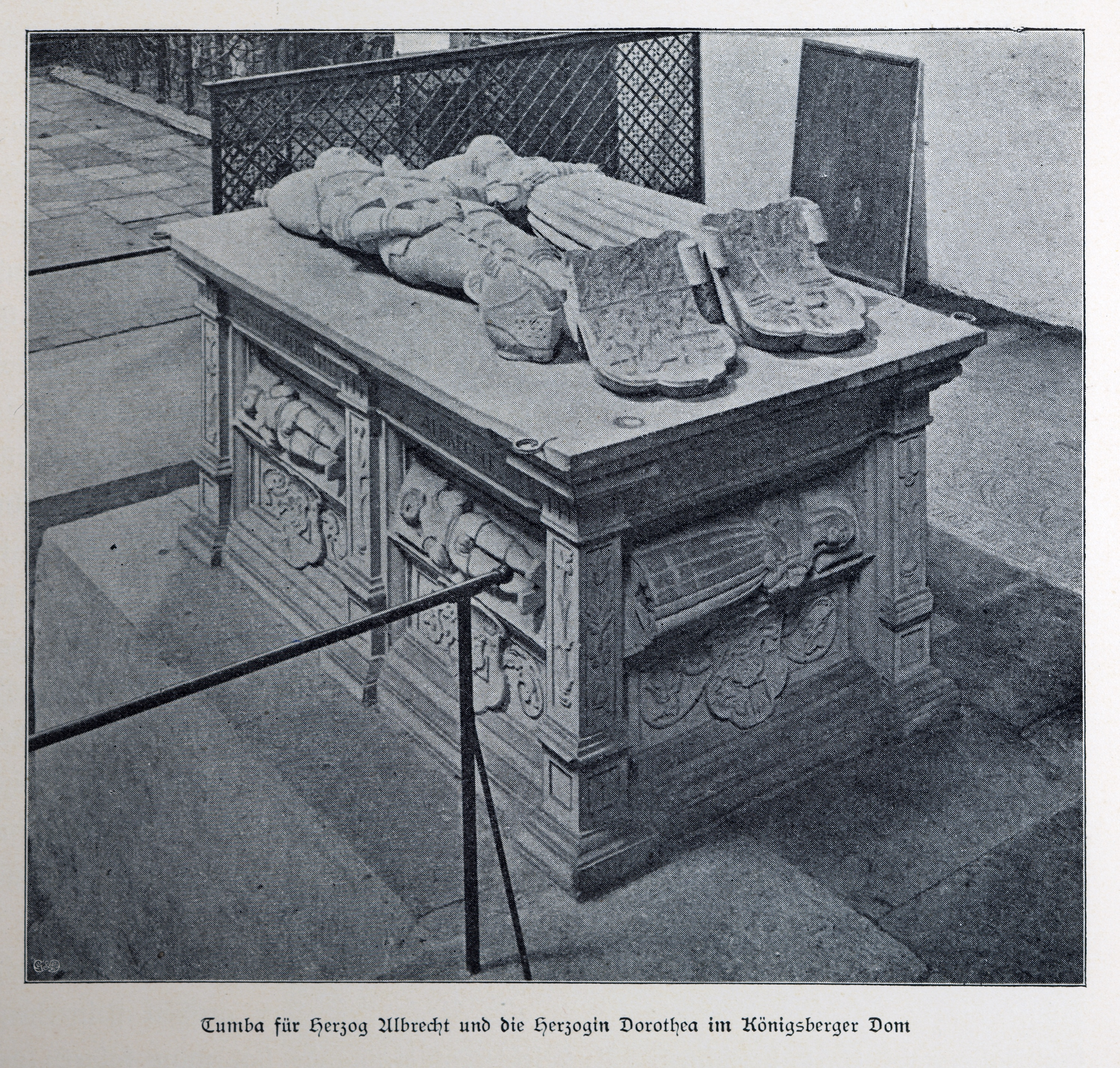 Tumba für Herzog Albrecht und Herzogin Dorothea im Königsberger Dom